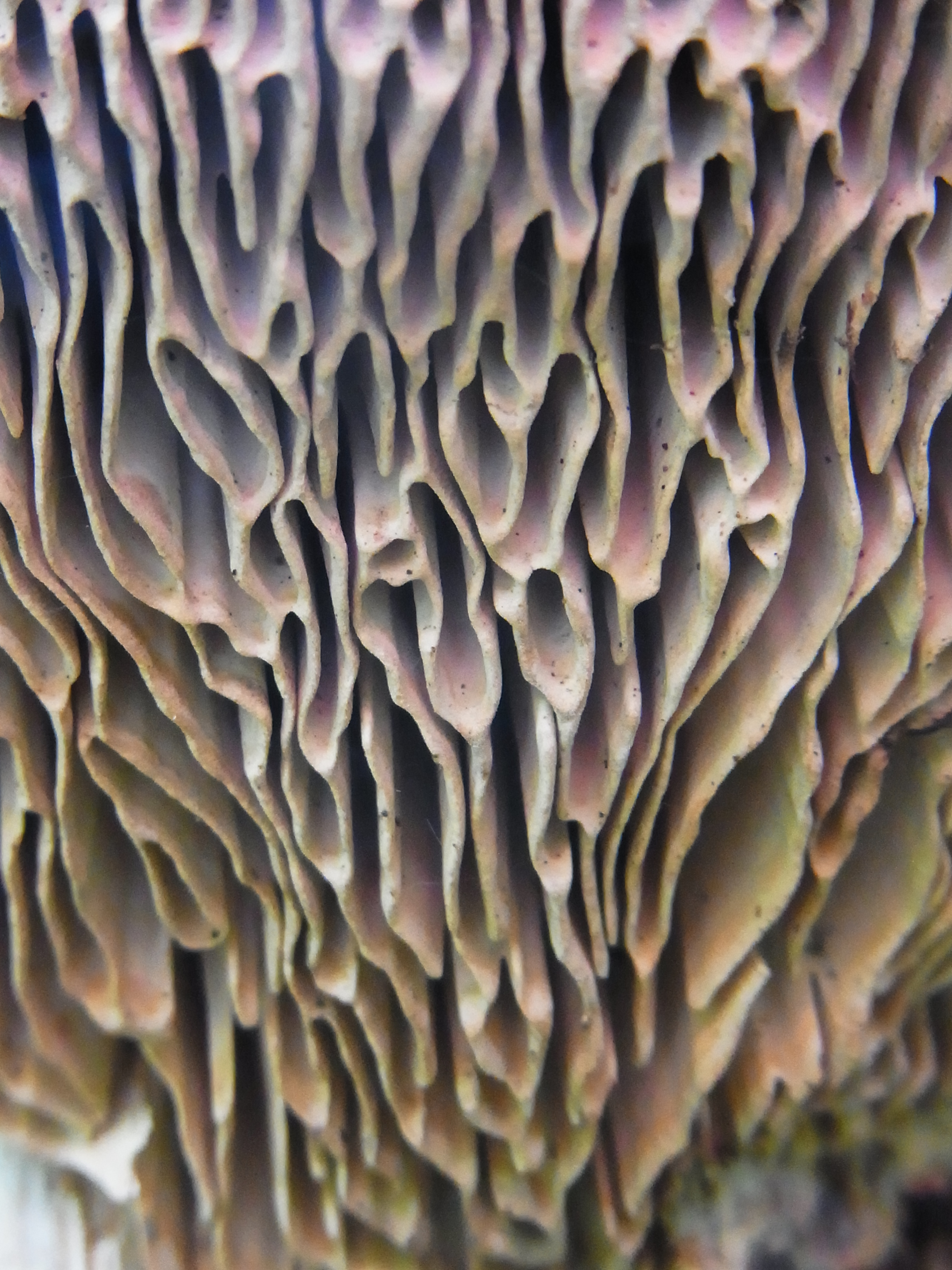 Daedalea quercina